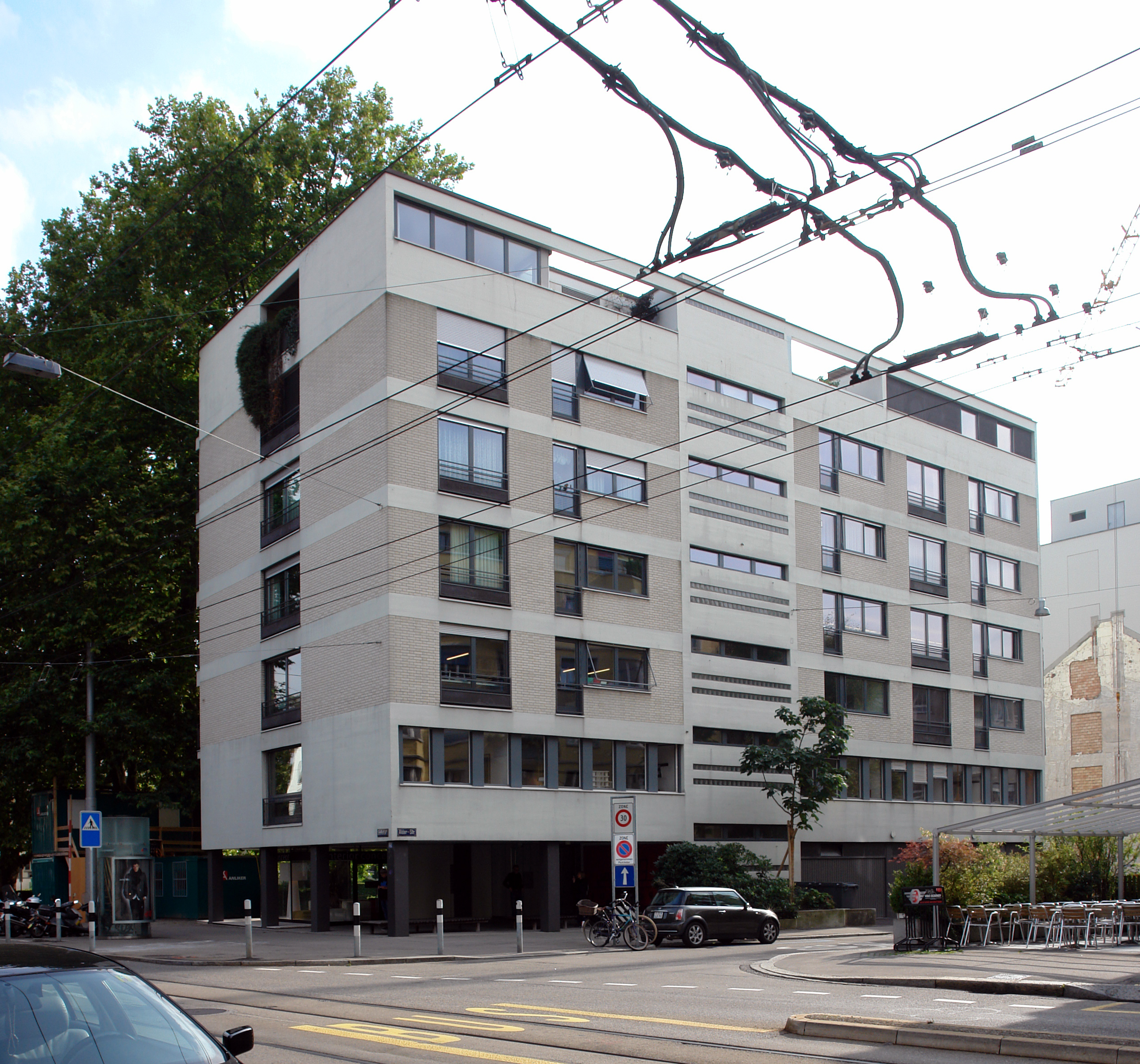 Büro- und Geschäftshaus Seefeldstrasse, Zürich. 1957–60. Architekt: Jakob Zweifel (*1921)